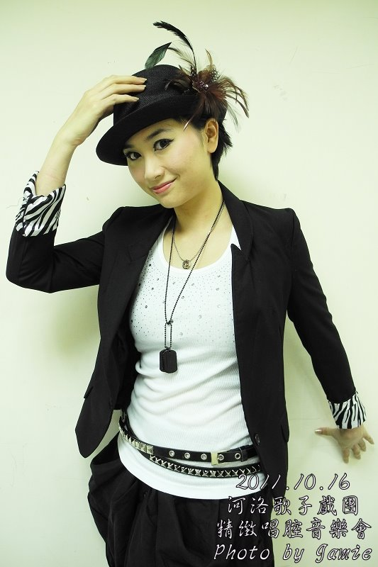 2011.10.16河洛歌子戲團-精緻唱腔音樂會-陳禹安為演唱者